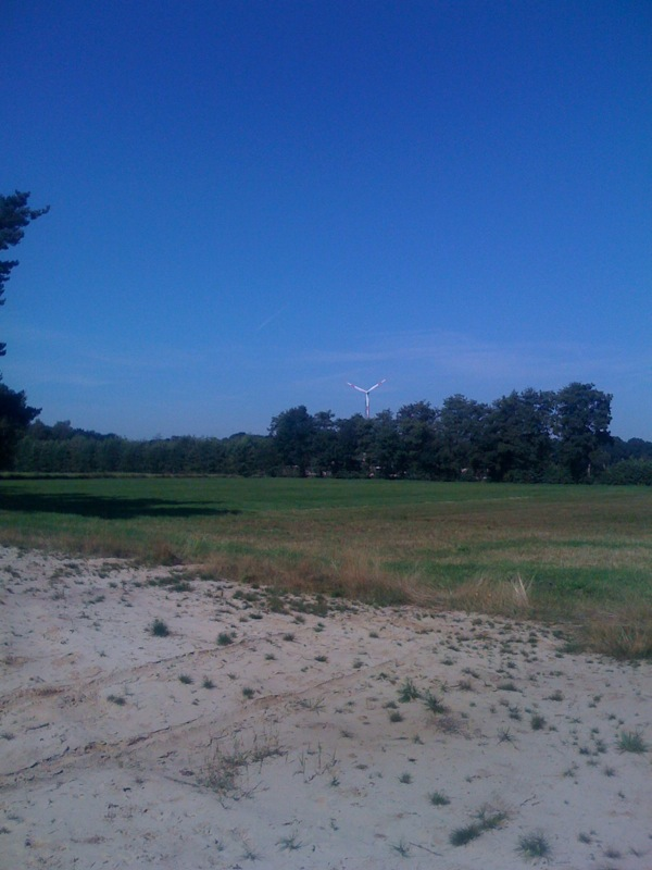 Kölkebecker Sand mit Windkraftanlage im Hintergrund